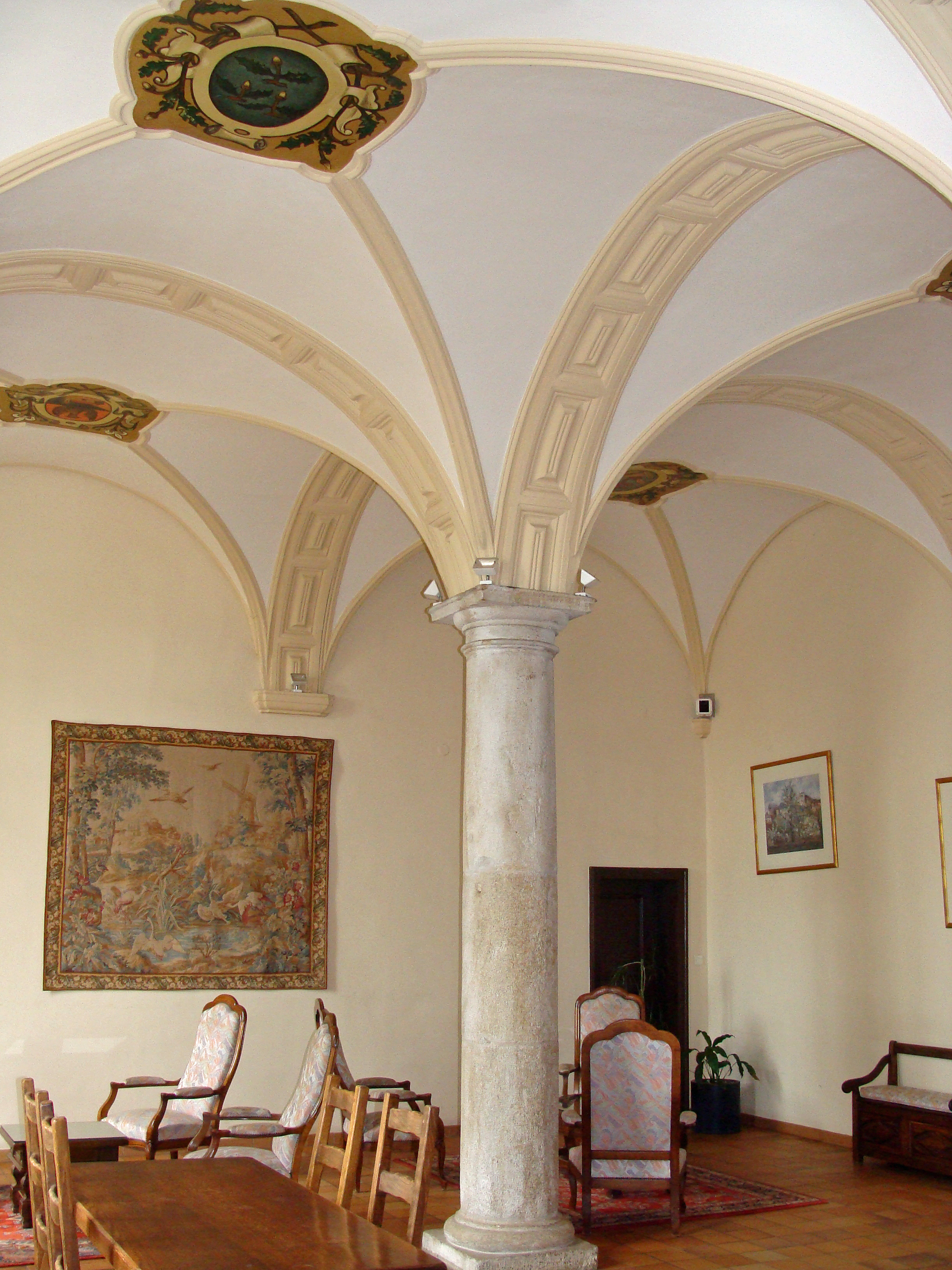 Abbaye Saint-Martin-des-Glandières. Le grand salon.